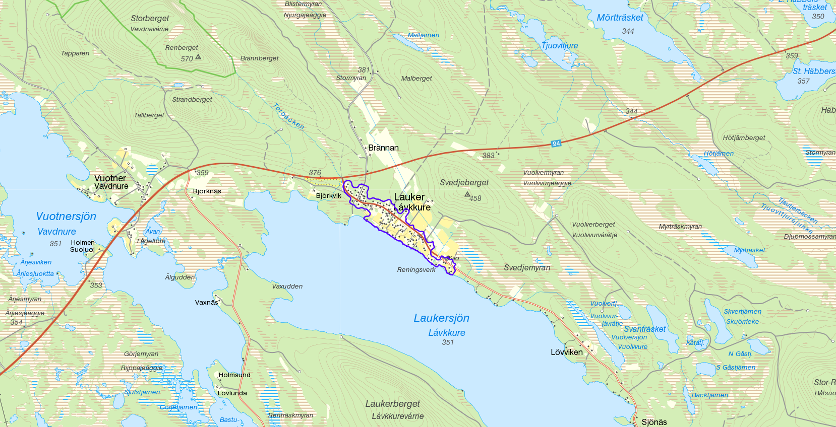 Småorten Lauker med gränserna från Statistiska centralbyråns småortsavgränsning 2015 i lila. Bakgrundskarta från Lantmäteriet, skala 1:30 236.